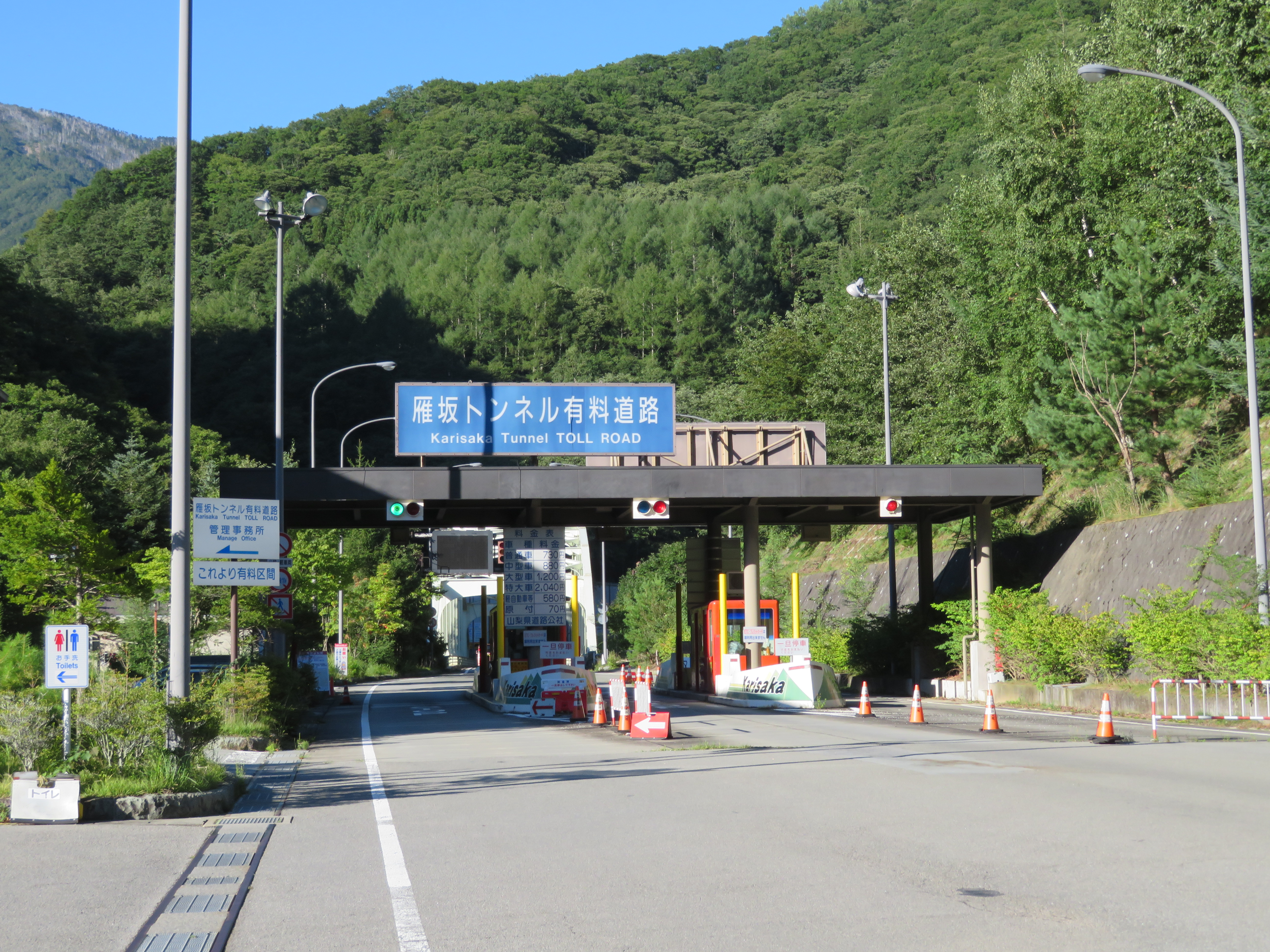 国道140号線雁坂トンネル有料道路料金所 Canon PowerShot SX720 HS